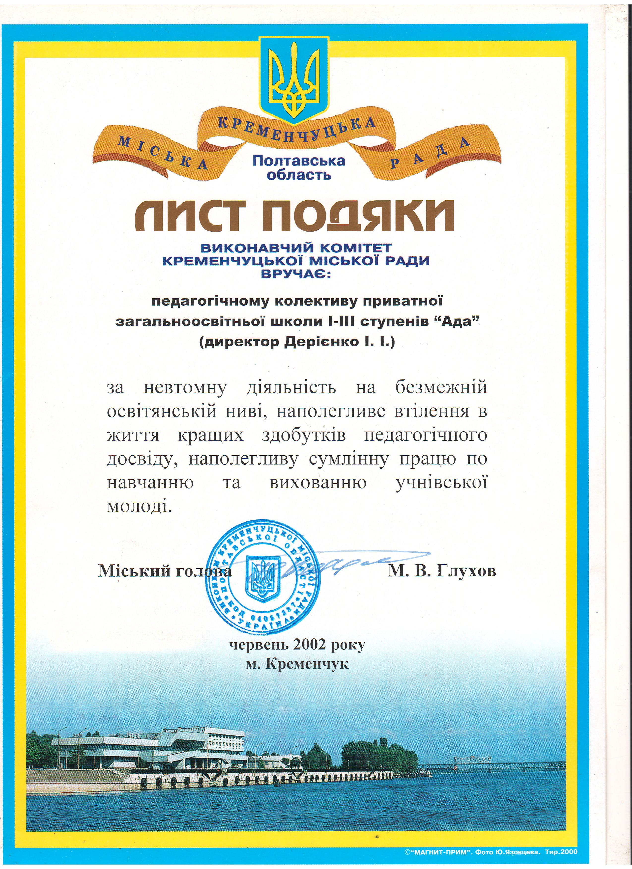 Благодарность педагогическому коллективу школы «Ада» (Кременчуг, Украира) от главы города